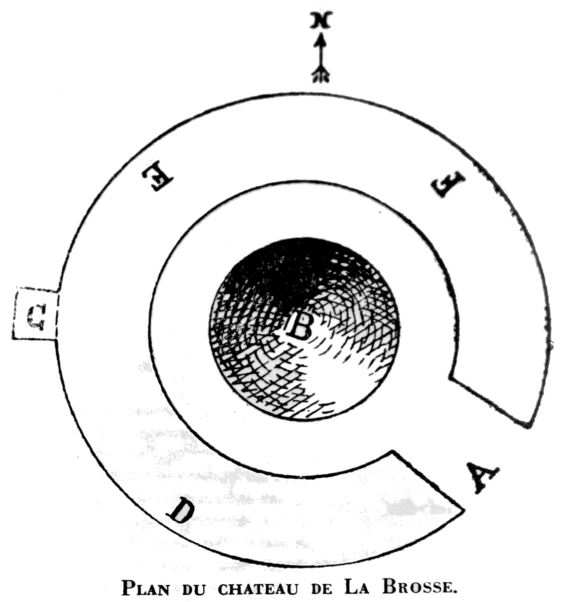 image de cf. le titre